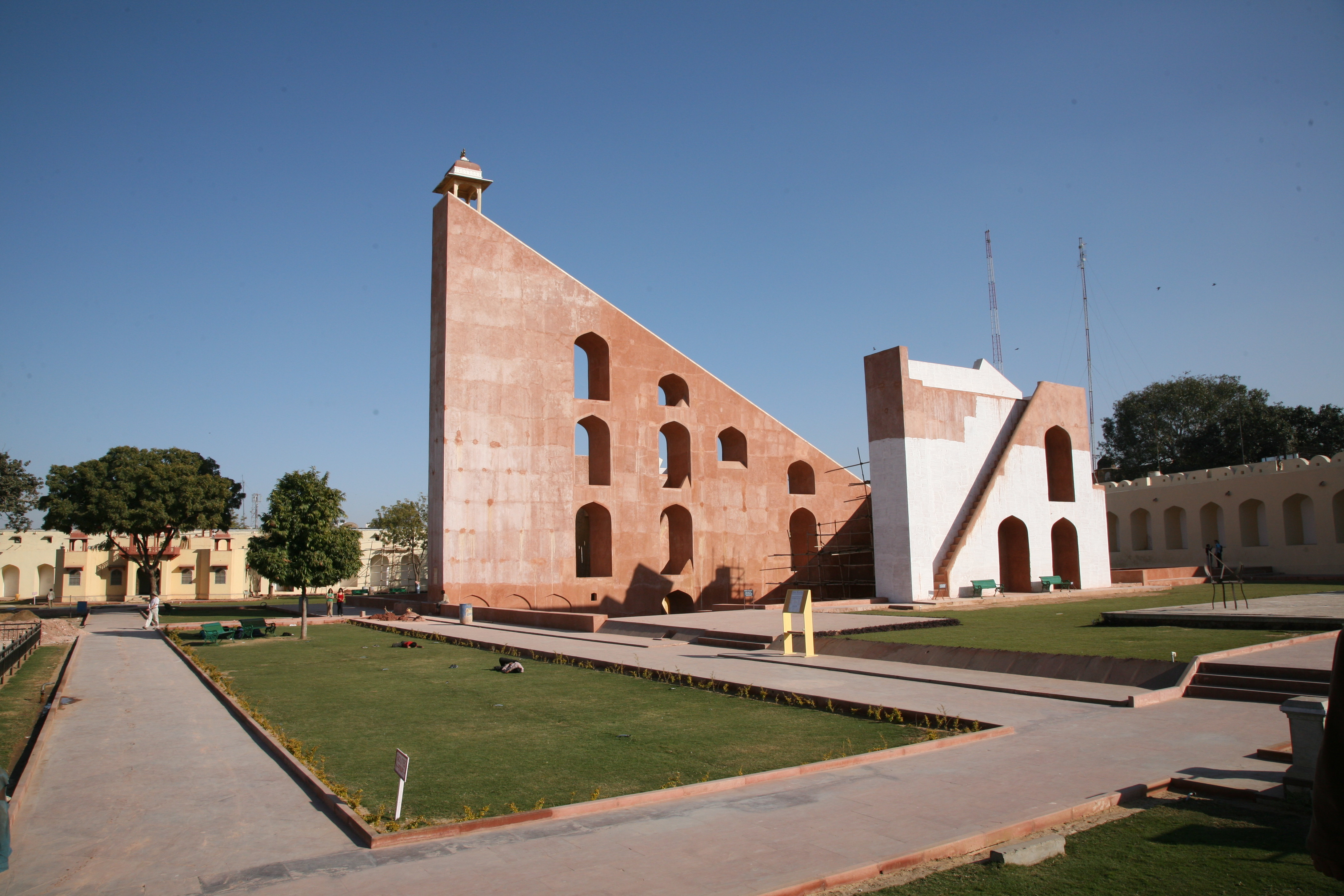 From Jantar Mantar in Jaipur.